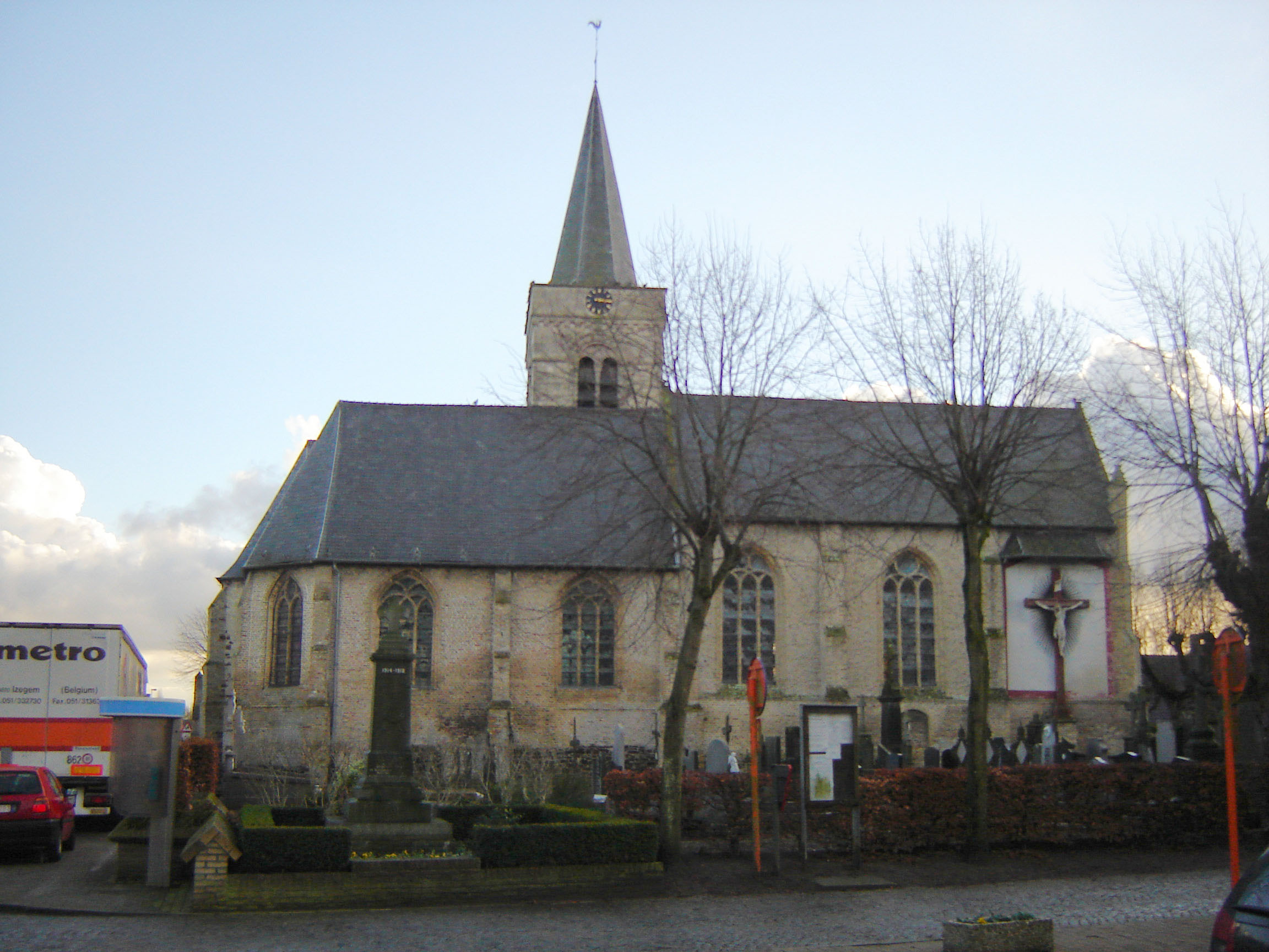 Sint-Mildredakerk in Izenberge, Alveringem. Saint Mildreda Church in Izenberge, Alveringem, West-Flanders, Belgium